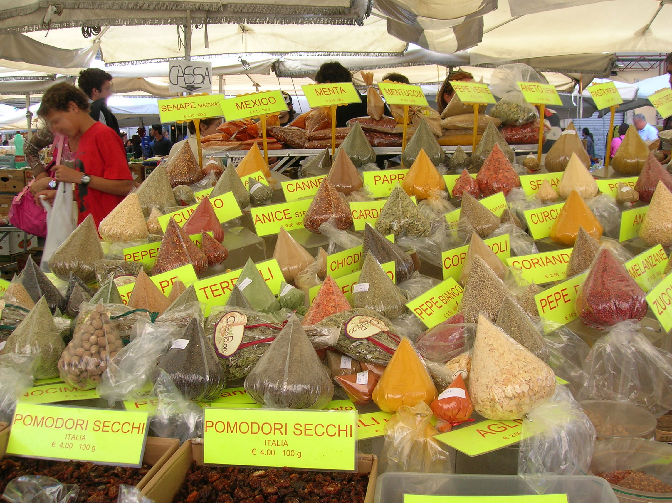 Spezie su un banco del mercato a Campo dei Fiori, Roma, Italia